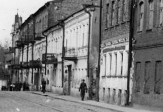 Weißrussland, Minsk, Straßenzug Strassen in Minsk, tiefe Löscher, in der Mitte schlecht angelegte Schienen. Minsk, Mai 1943 Foto: Lipke Film- u. Bild-Nr.: F.R. 13/26 Information added by Wikimedia users.Беларуская (тарашкевіца): Вуліцы ў Менску, кепска пракладзеныя рэйкі ў сярэдзіне здымка. Травень 1943 году.